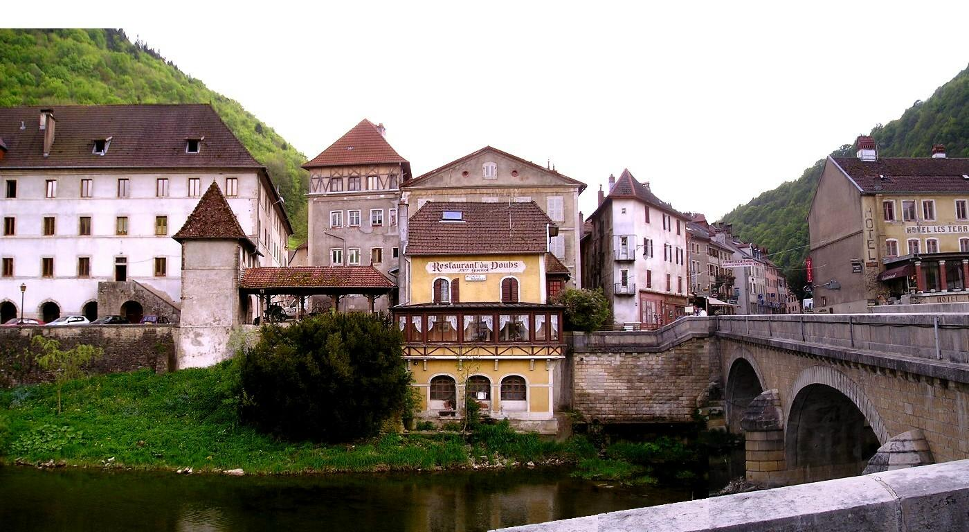 Saint-Hippolyte en Département Doubs (Franche-Comté) Mai 2005 Selbst erstelltes Bild, nachbearbeitet